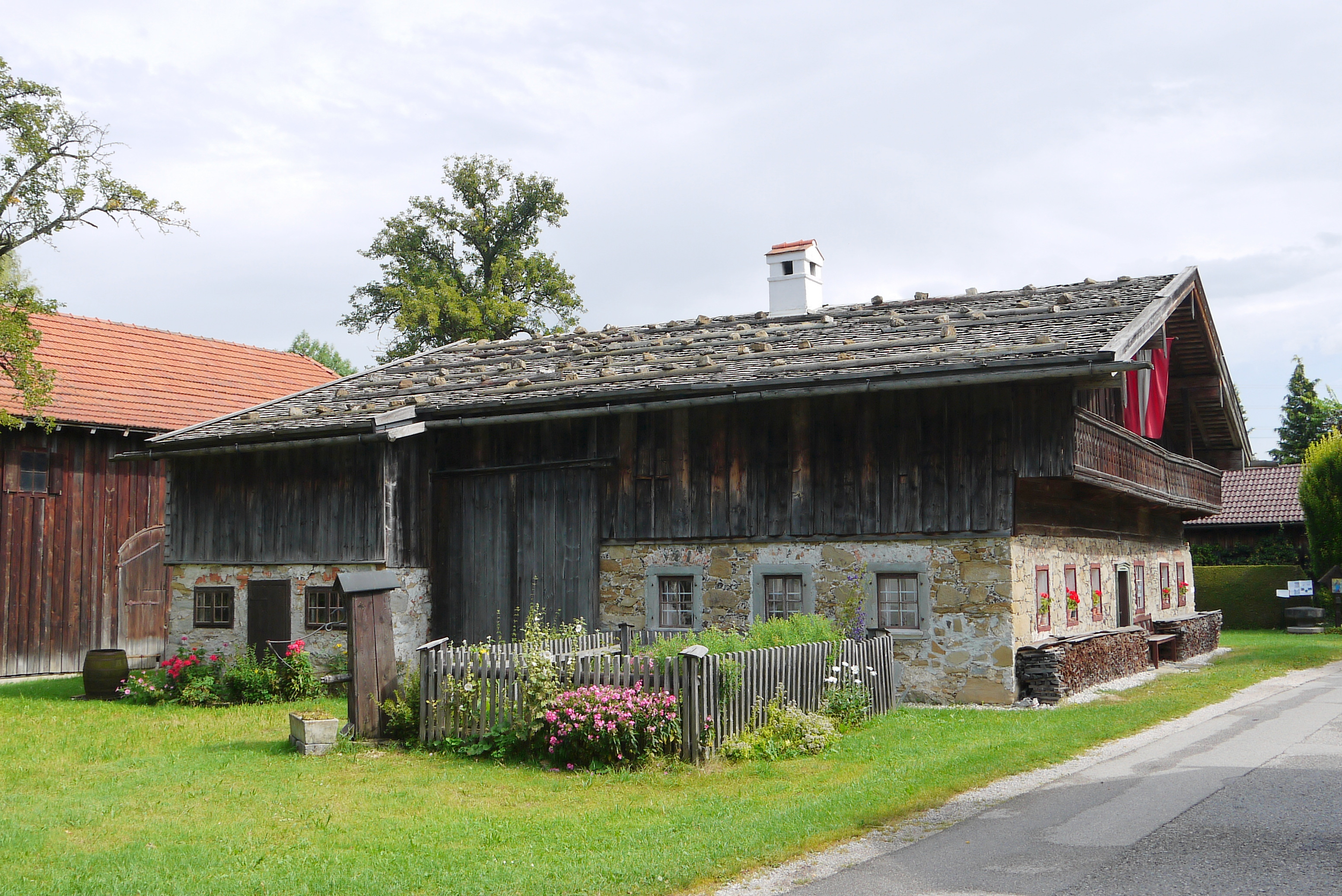 Freilichtmuseum Aignerhaus, Heimatmuseum